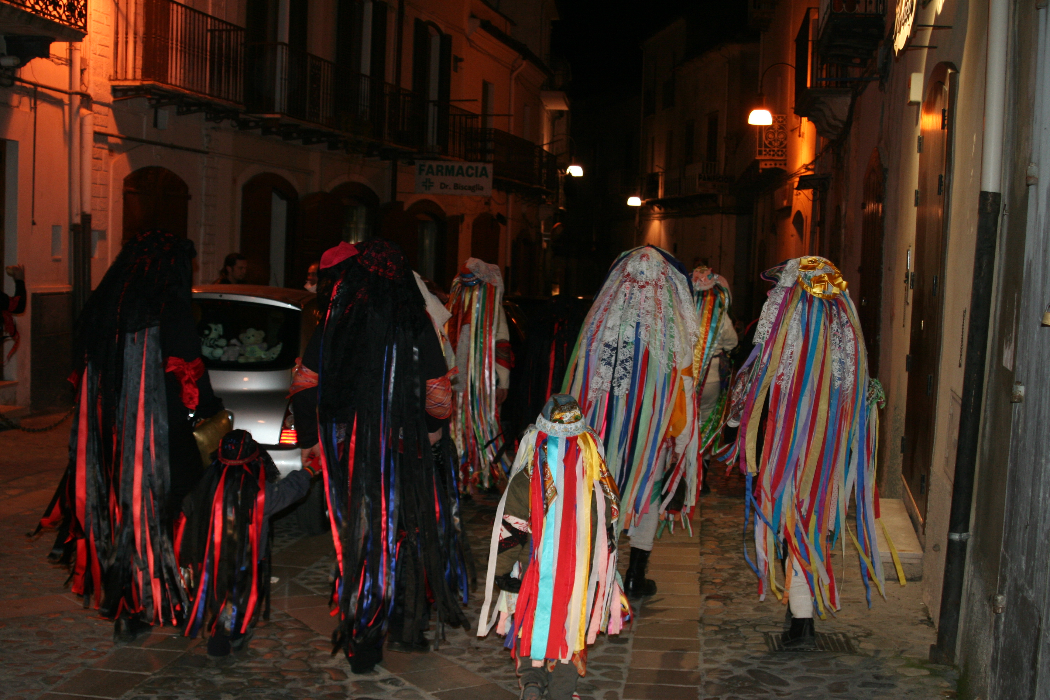 Sfilata del 17 gennaio 2009 - un piccolo gruppo di ritorno dalla questua.